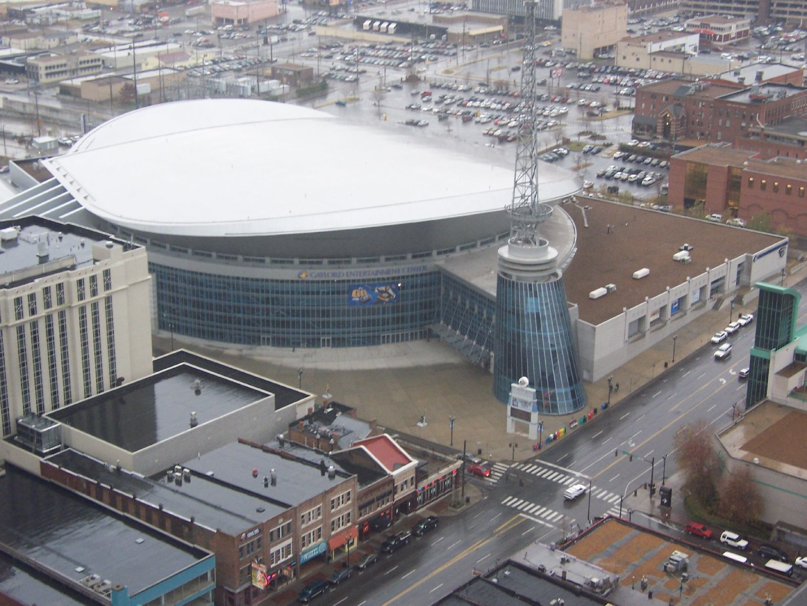 Le Gaylord Entertainment Center de Nashville en décembre 2005.